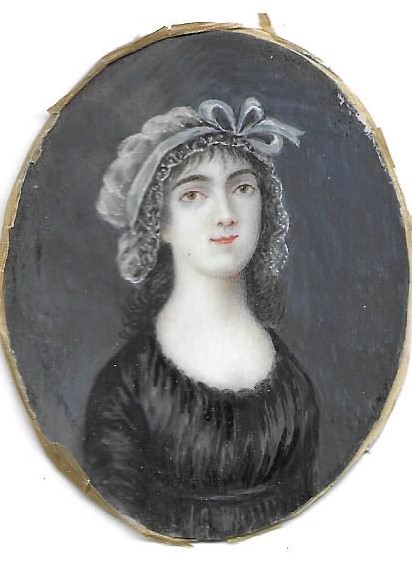 Portrait miniature de Angélique Bosquillon du Fay vers 1790